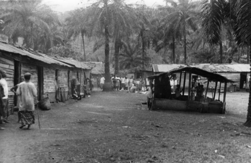 21.) Die Arbeitercamps sind quadratisch angelegt. In einem Raum von 4 qm wohnen 2 Eingeborene. In der Mitte des Platzes befindet sich die Kochstelle.